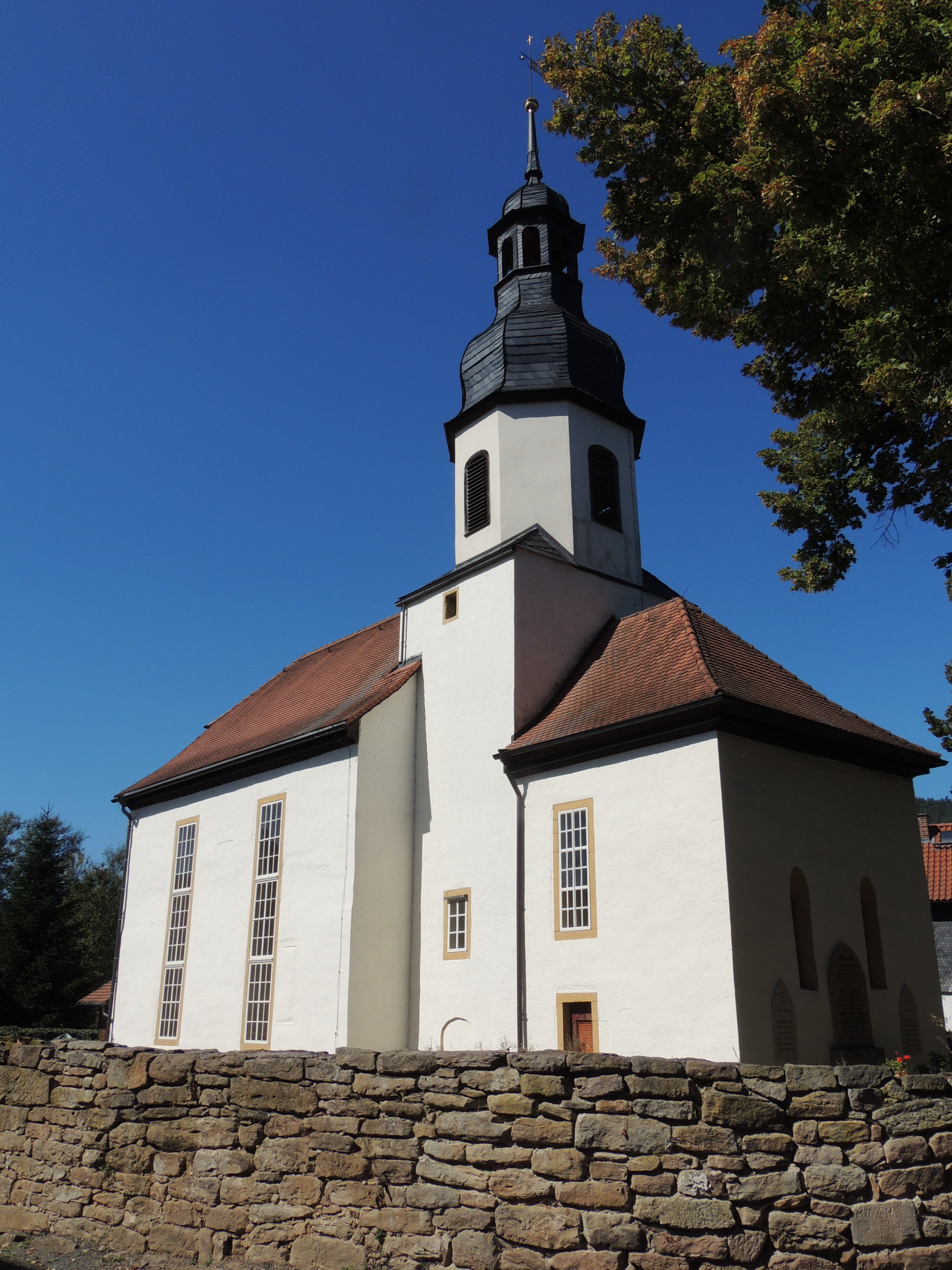 Denkmalgeschützte Kirche in Weißen, Gemeinde Uhlstädt-Kirchhasel